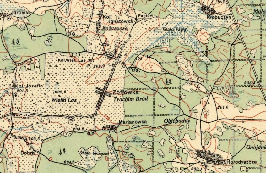 Ignatówka i Zofjówka na mapie